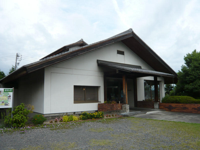 土岐市美濃陶磁歴史館